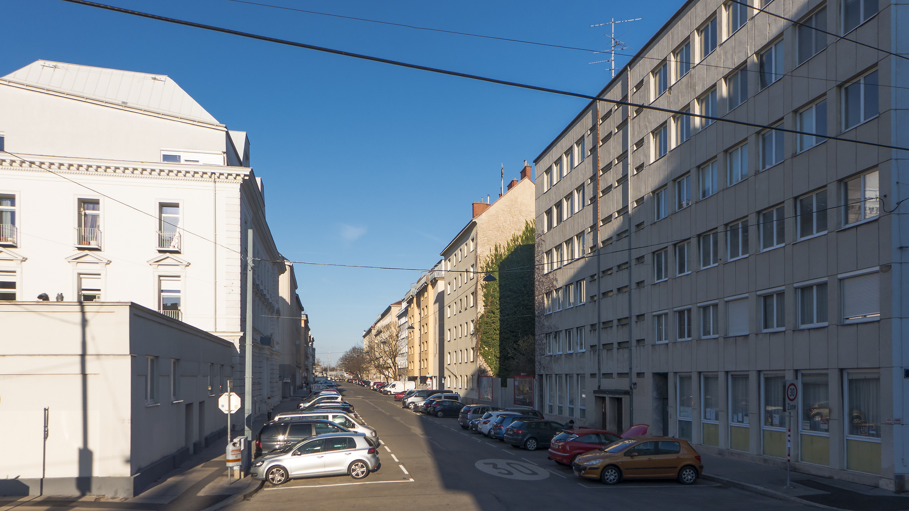 Alliiertenstraße in Wien 2 bei Am Tabor Richtung Norden